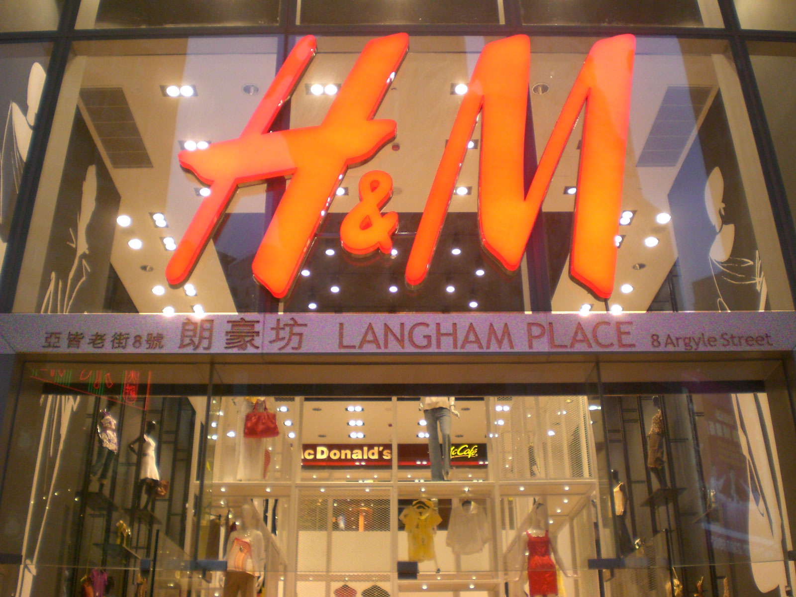 H&M, 朗豪坊, 砵蘭街